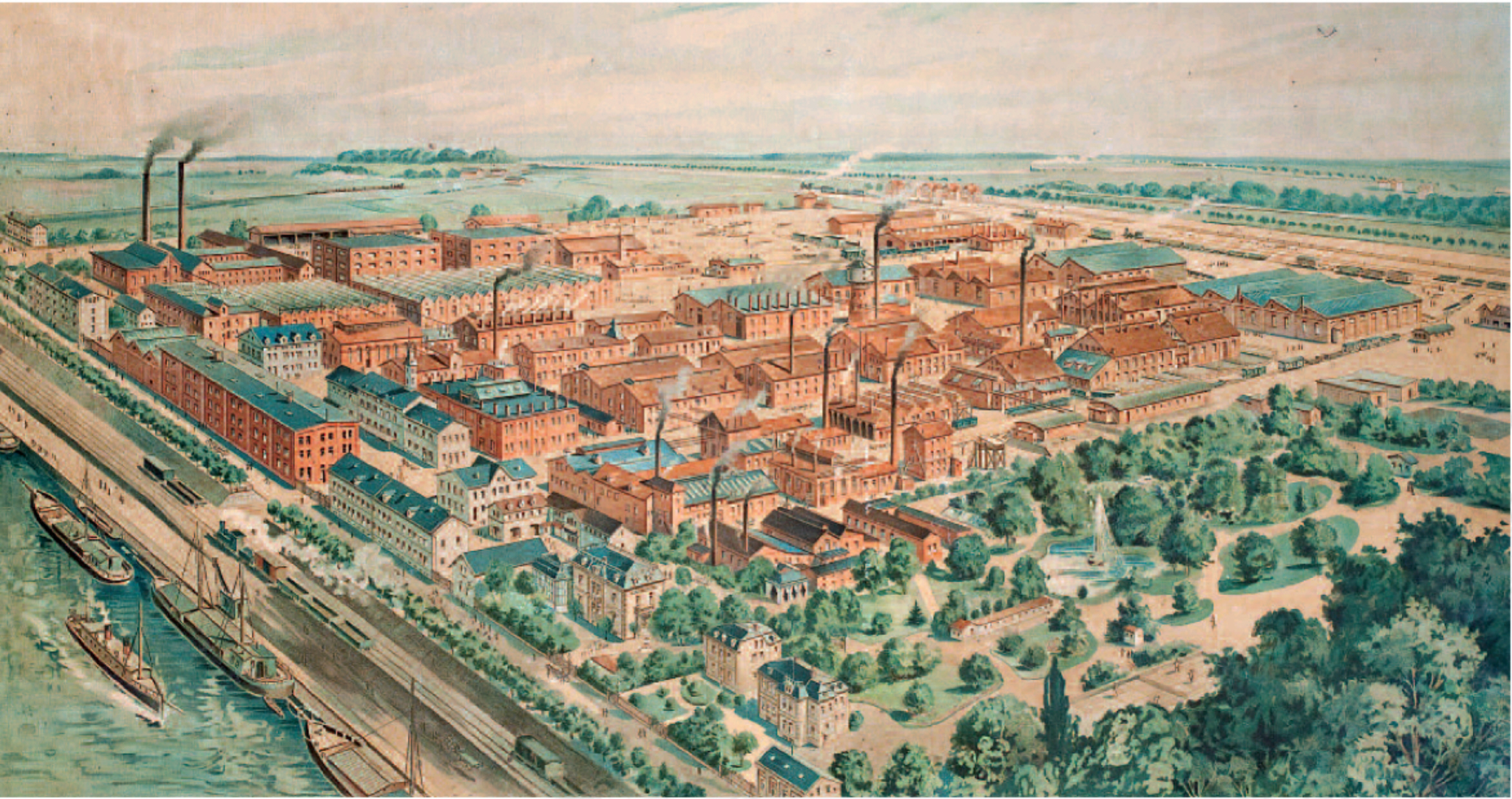 Naphtol-Chemie Offenbach (der Chemischen Fabrik Griesheim-Elektron), bis 1905: K. Oehler Anilin- und Anilinfarbenfabrik